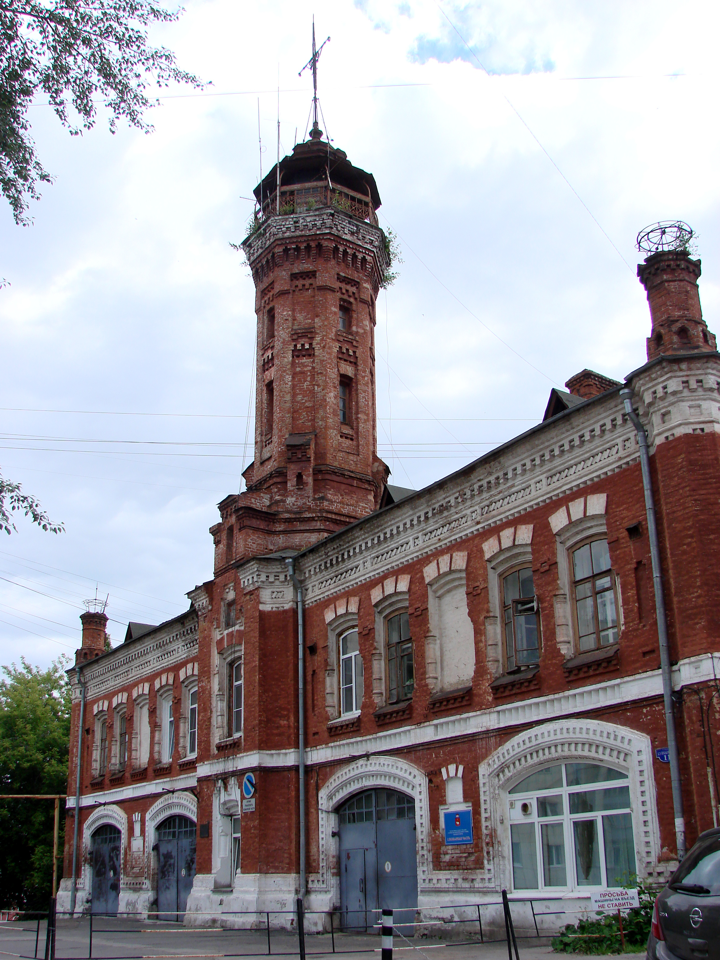 Пожарная каланча 1883 г., архитекторы В.В. Попатенко (основание), Р.О. Карвовский (каланча) Пермь, улица Куйбышева, 11, стр.2